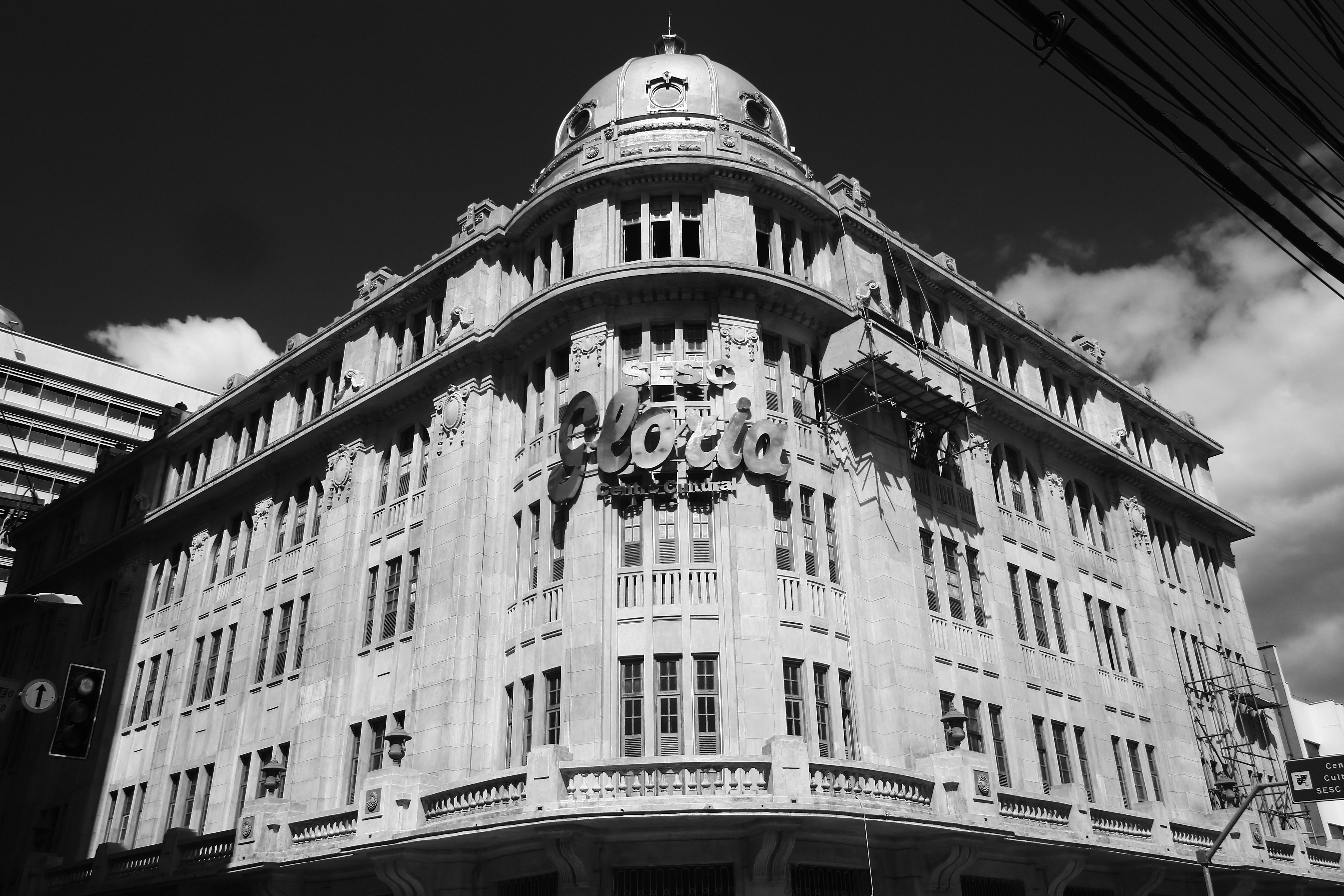 Centro, Vitória - ES, Brazil